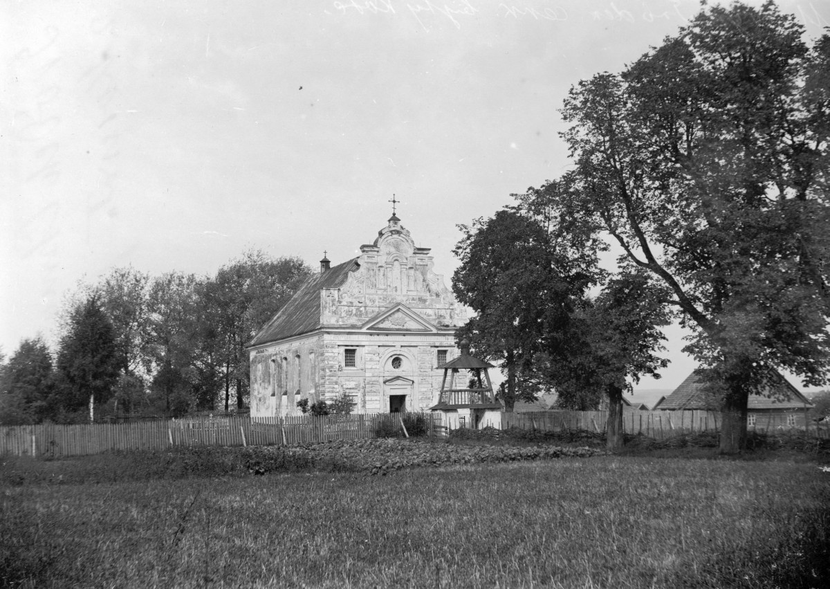 Беларуская (тарашкевіца): Сёмкаў Гарадок (Siomkaŭ Haradok). Касьцёл Нараджэньня Найсьвяцейшай Панны Марыі і Сьвятога Станіслава